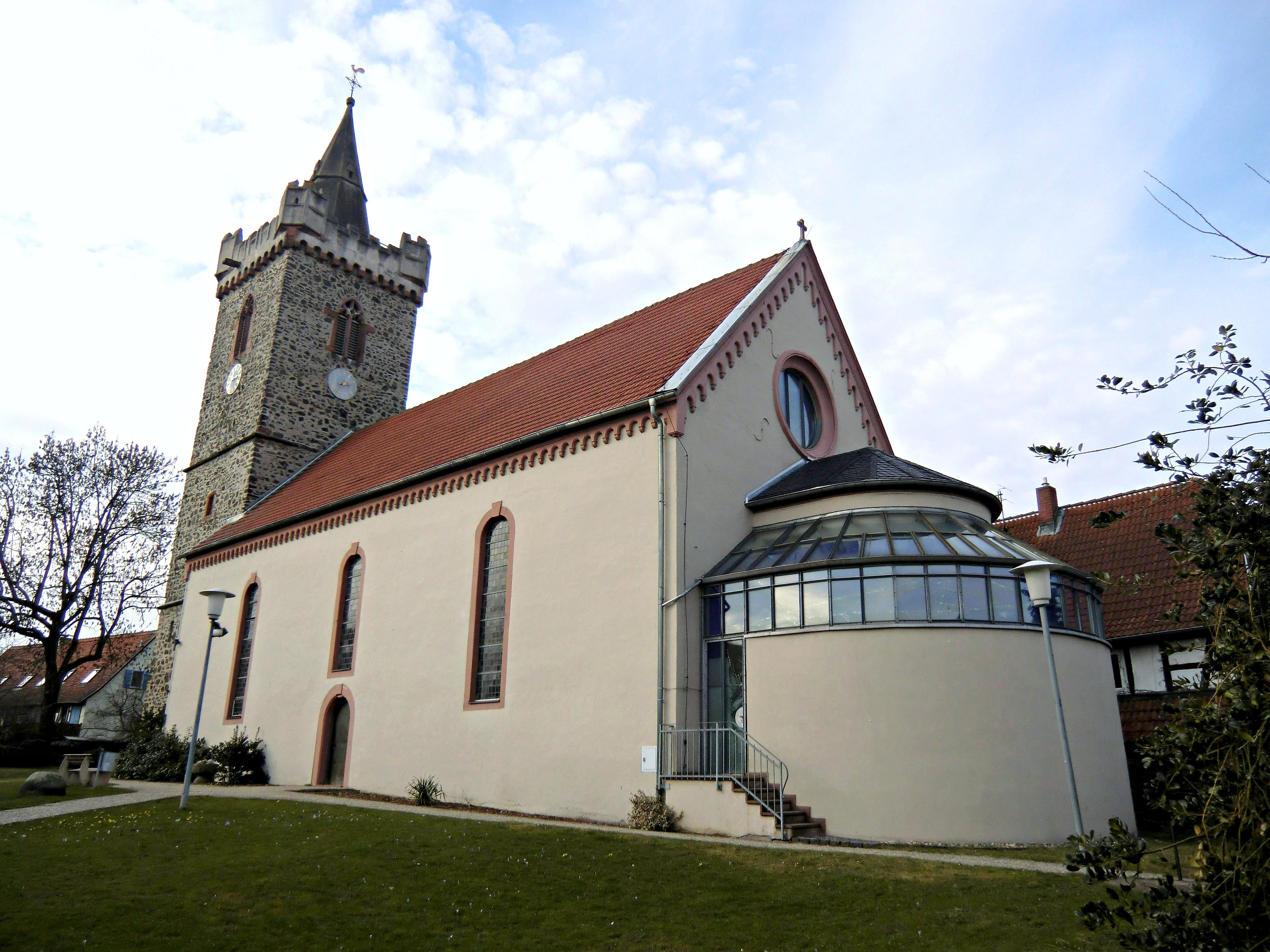 Jakobuskirche aus dem 14. Jahrhundert. Mit dem historischen Rathaus im Stadtkern Wahrzeichen von Bruchköbel.This is a photograph of an architectural monument.